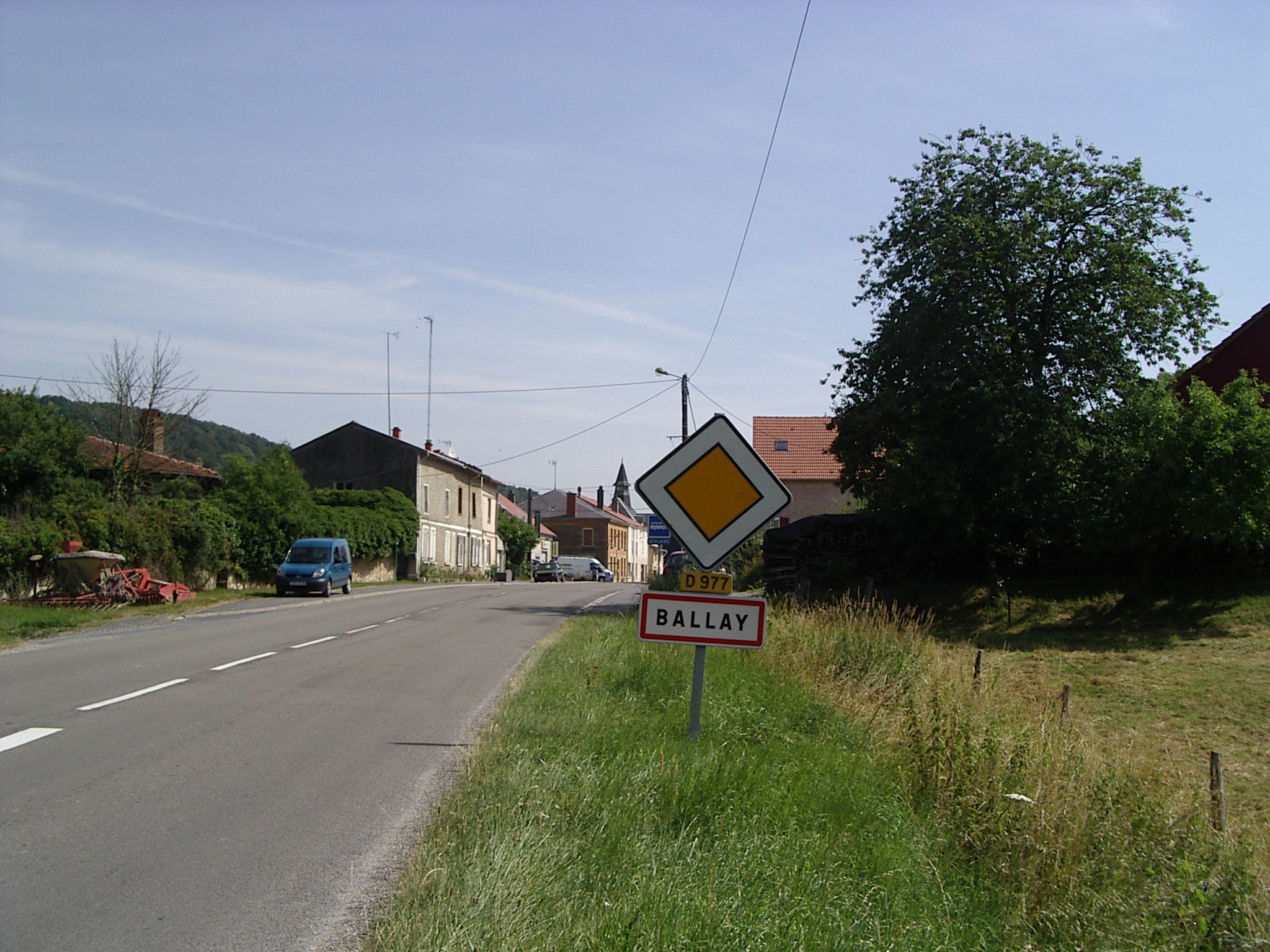 Ballay est une commune française, située dans le département des Ardennes et la région Champagne-Ardenne : Borne limite de Commune